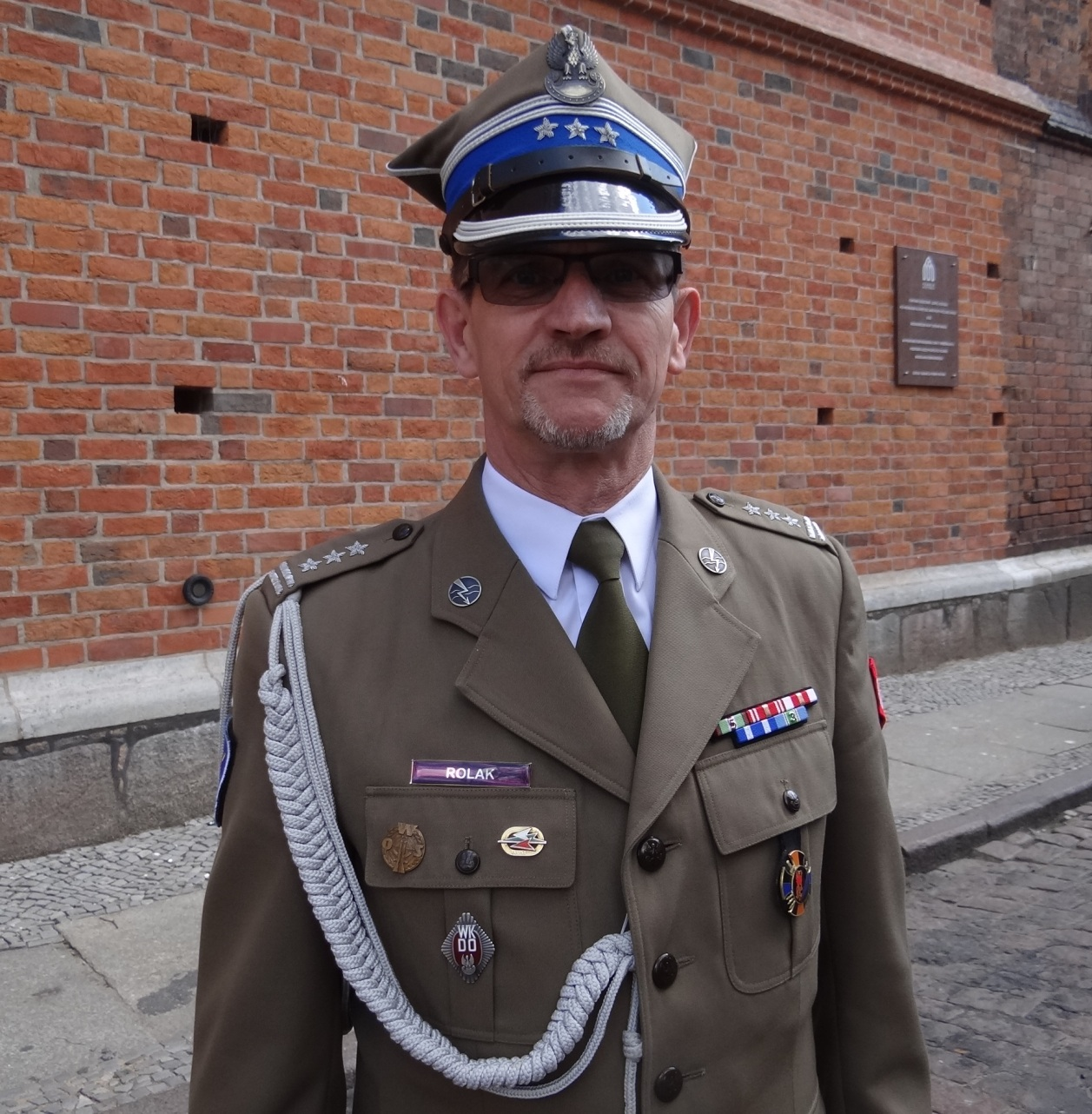 Dowódca garnizonu Stargard płk Jacek Rolak